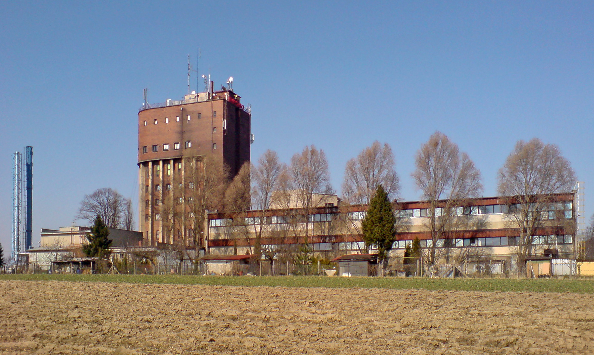 Wieża ciśnień przy ulicy Starowiejskiej w Raciborzu